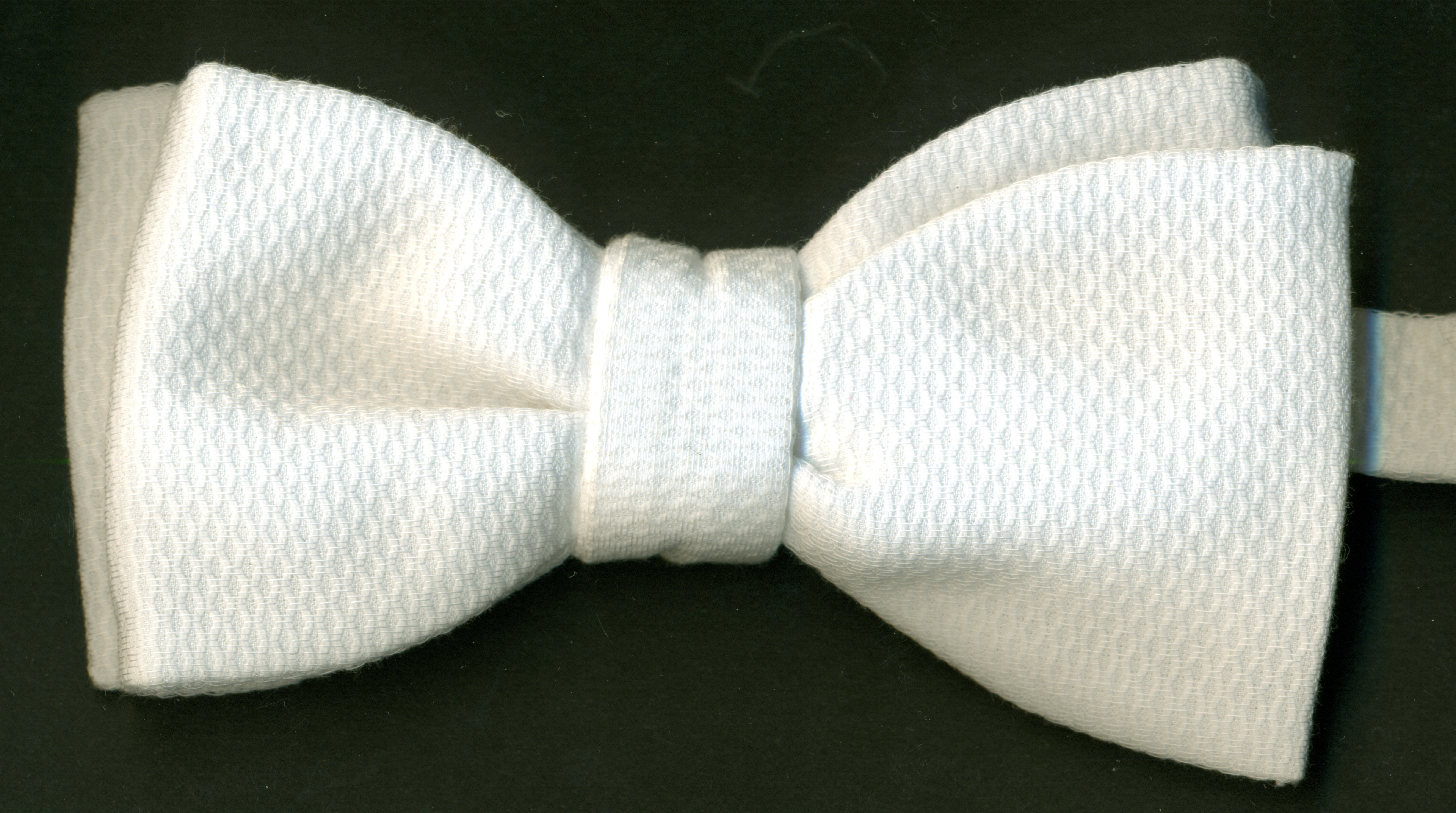 Fliege aus Baumwoll-Pikee weiß. Klassisches Modell für "White Tie Events". Vorderseite